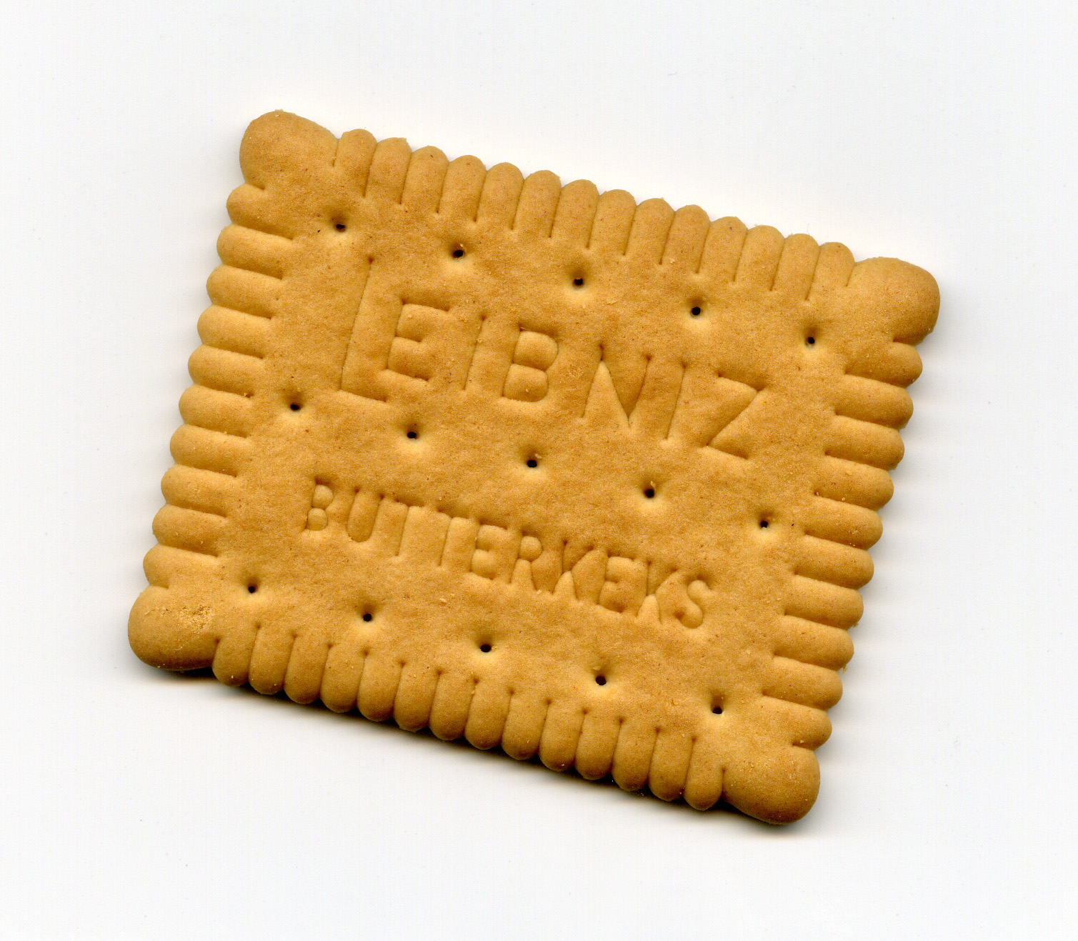 Leibniz Butterkeks. Eigene Aufnahme, GNU FDL